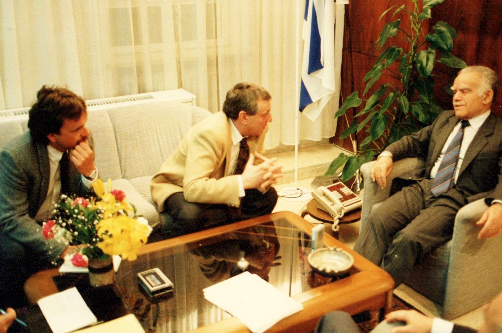 Илья Герол берет интервью у премьер министра Израиля Ицхак Шамира